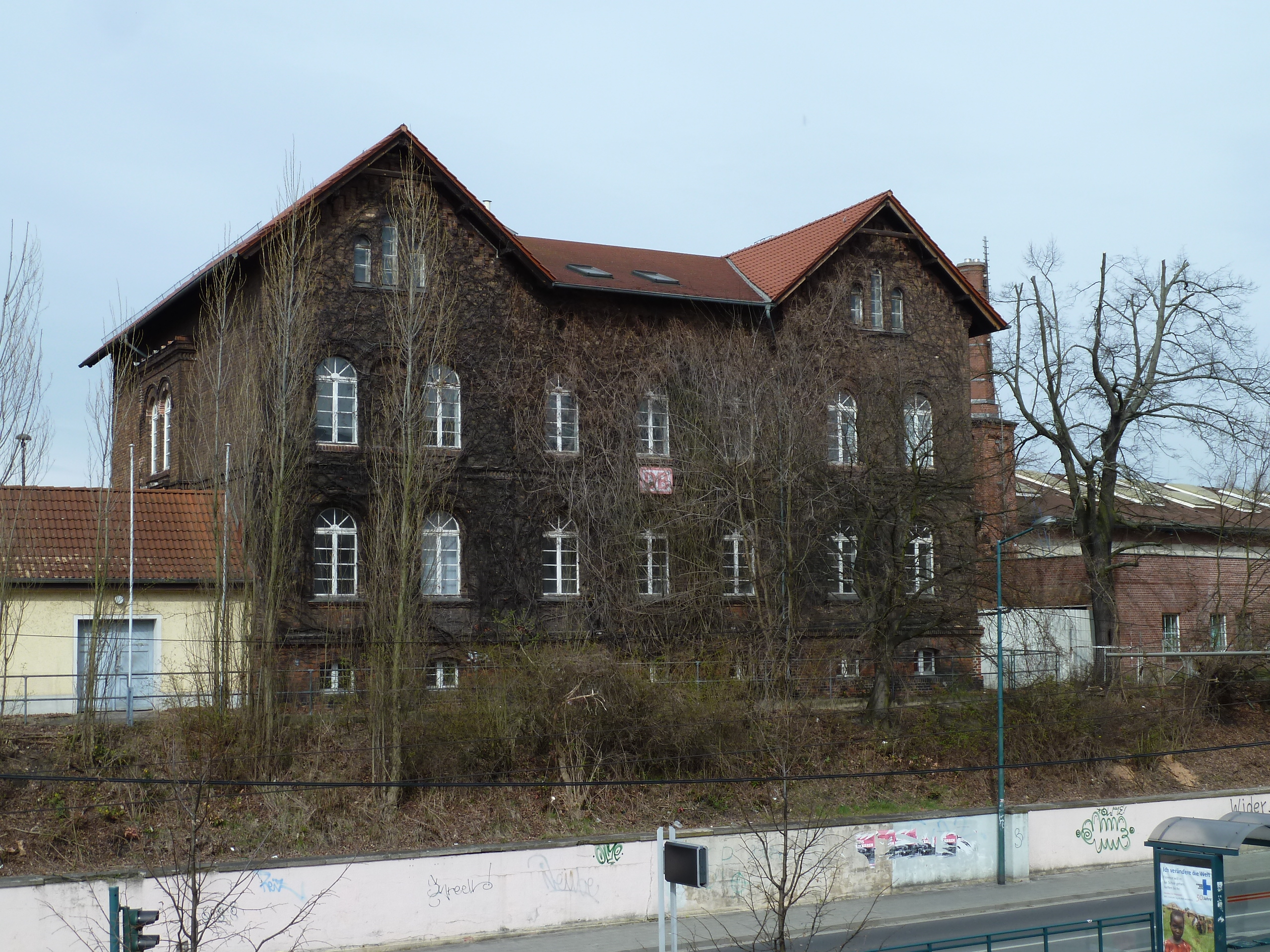 Denkmalgeschütztes Gebäude am Bahnhof Frankfurt (Oder), Teil des Kopfbahnhofs aus dem 19. Jahrhundert